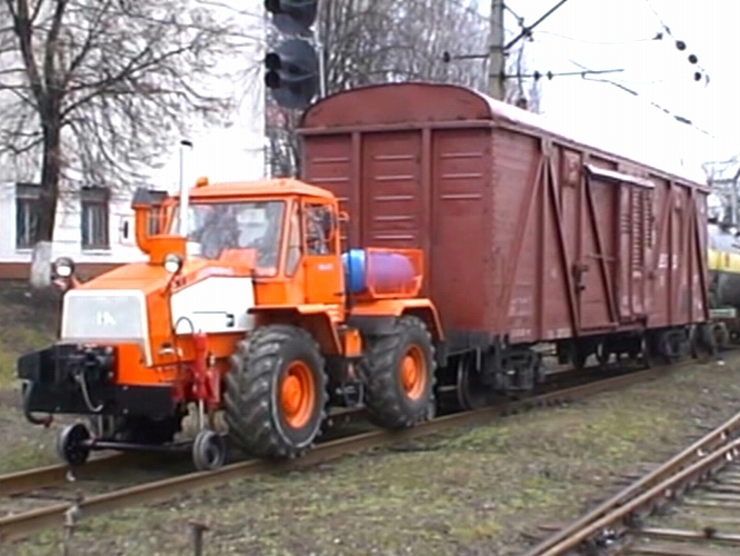 Мотовоз маневровый ММТ-2 на базе трактора ХТА-220, (локомобиль), ООО "Спецкран" - собственная разработка и производство, г. Харьков